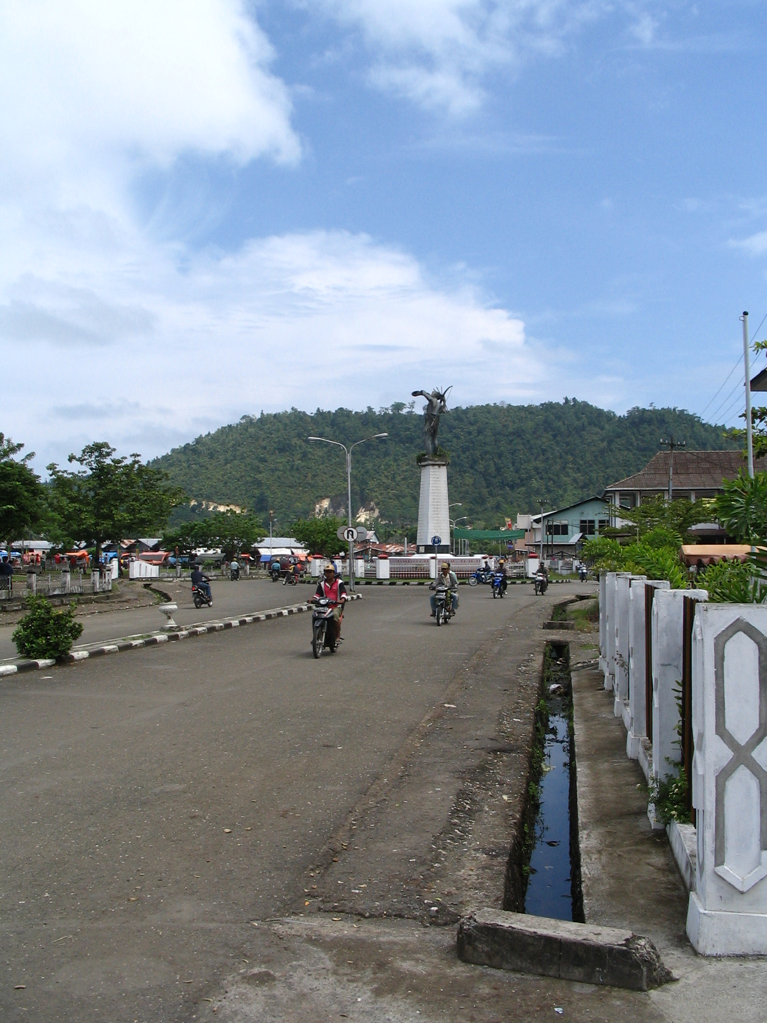 Boulevard te Serui